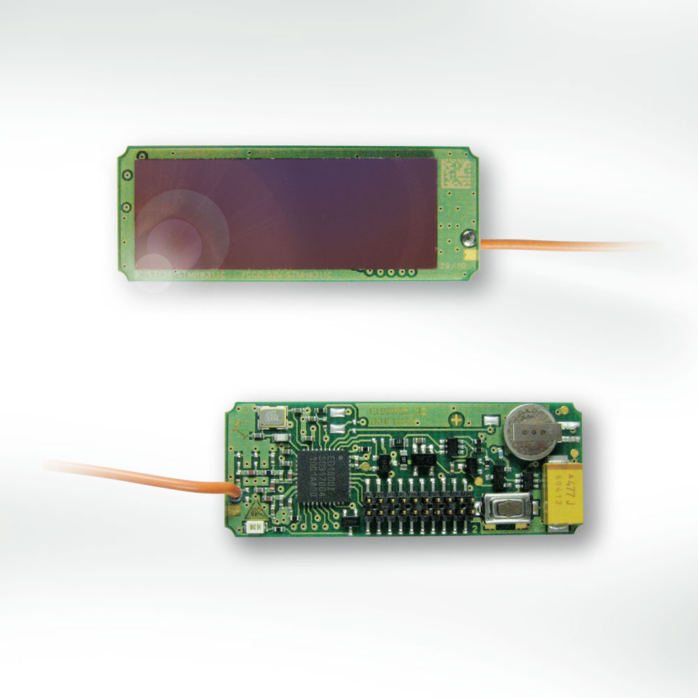 EnOcean STM 310 Funksensormodul